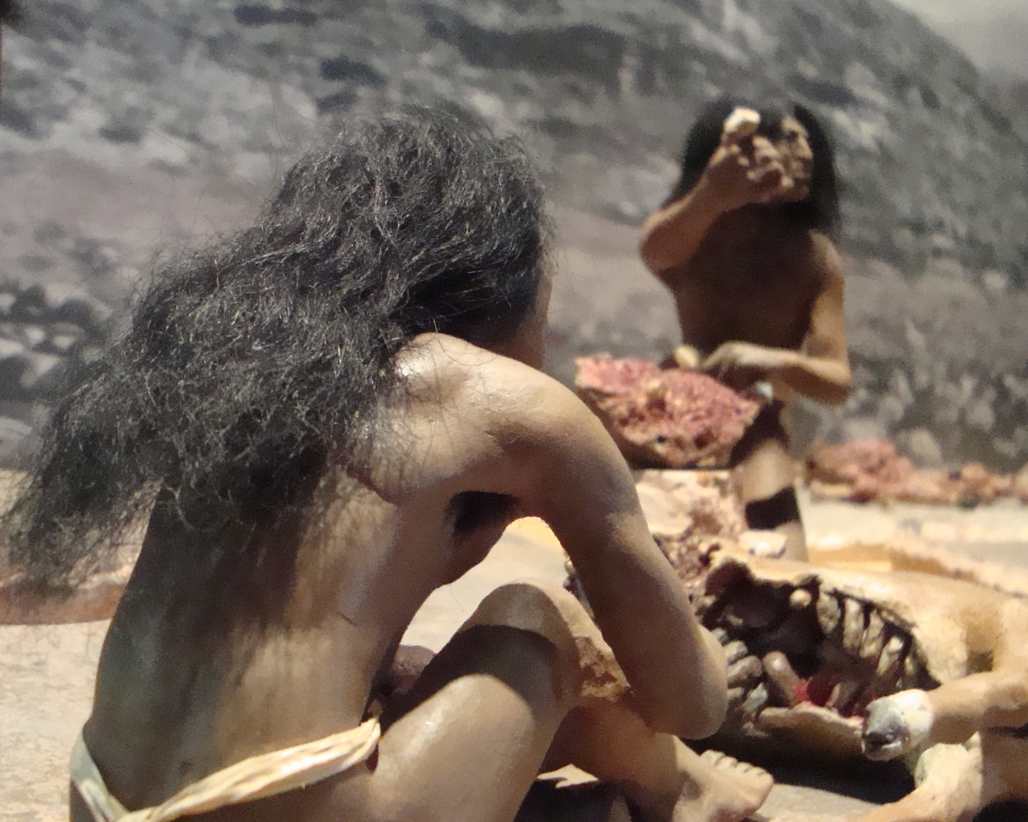 Recreación de la vida en el cerro de Tlapacoya (estado de México) durante el período Cenolítico (12000-7000/5000 a. C.). Maqueta exhibida en el Museo Nacional de Antropología de México.